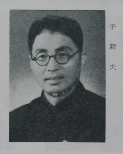 中國人民政治協商會議第一屆全體會議代表